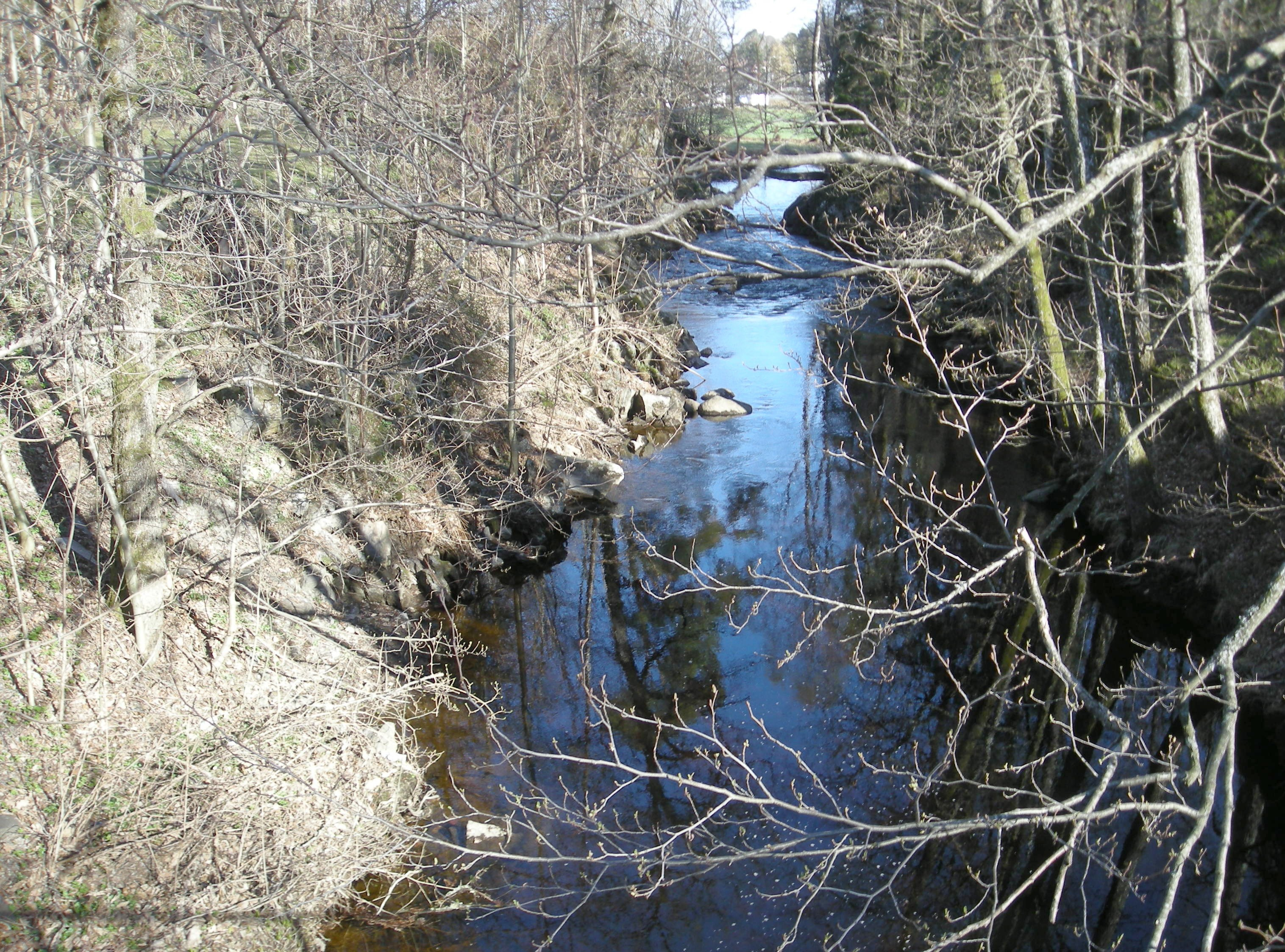 Lilleelv like sør for Bjorbekk kirke